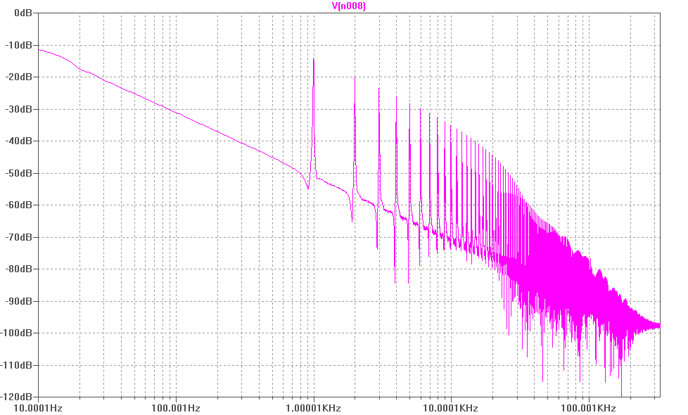 Leistungsdichtespektrum eines Signals mit der Hauptfrequenz 1 kHz